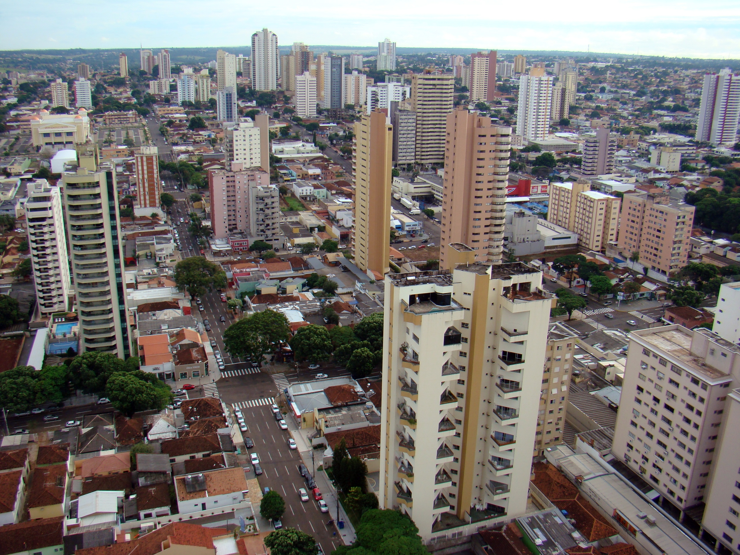 Vista de Campo Grande a partir do 27º andar do Hotel Bahamas